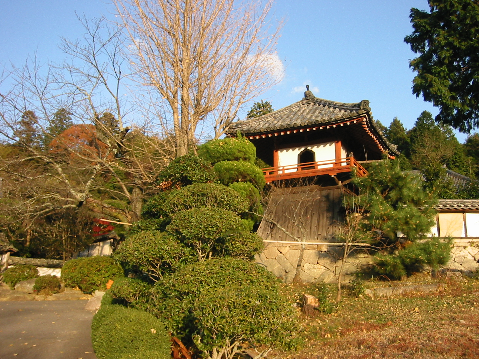 姑射山東光寺 銅鐘